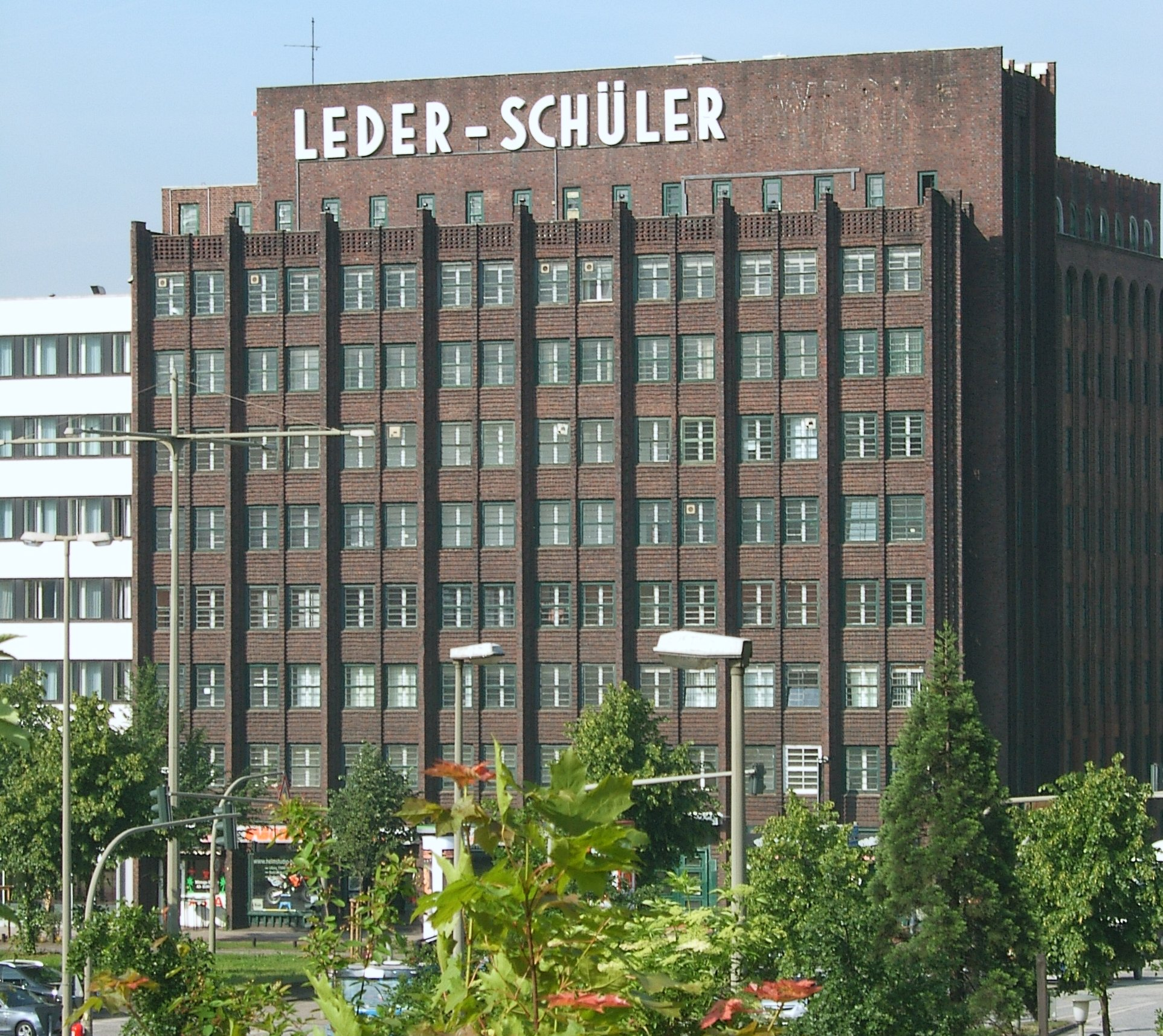 Hamburg, Kontorhaus Leder-Schüler im Heidenkampsweg 32. Erbaut 1927/28 nach Plänen von Fritz Höger. This is a photograph of an architectural monument.